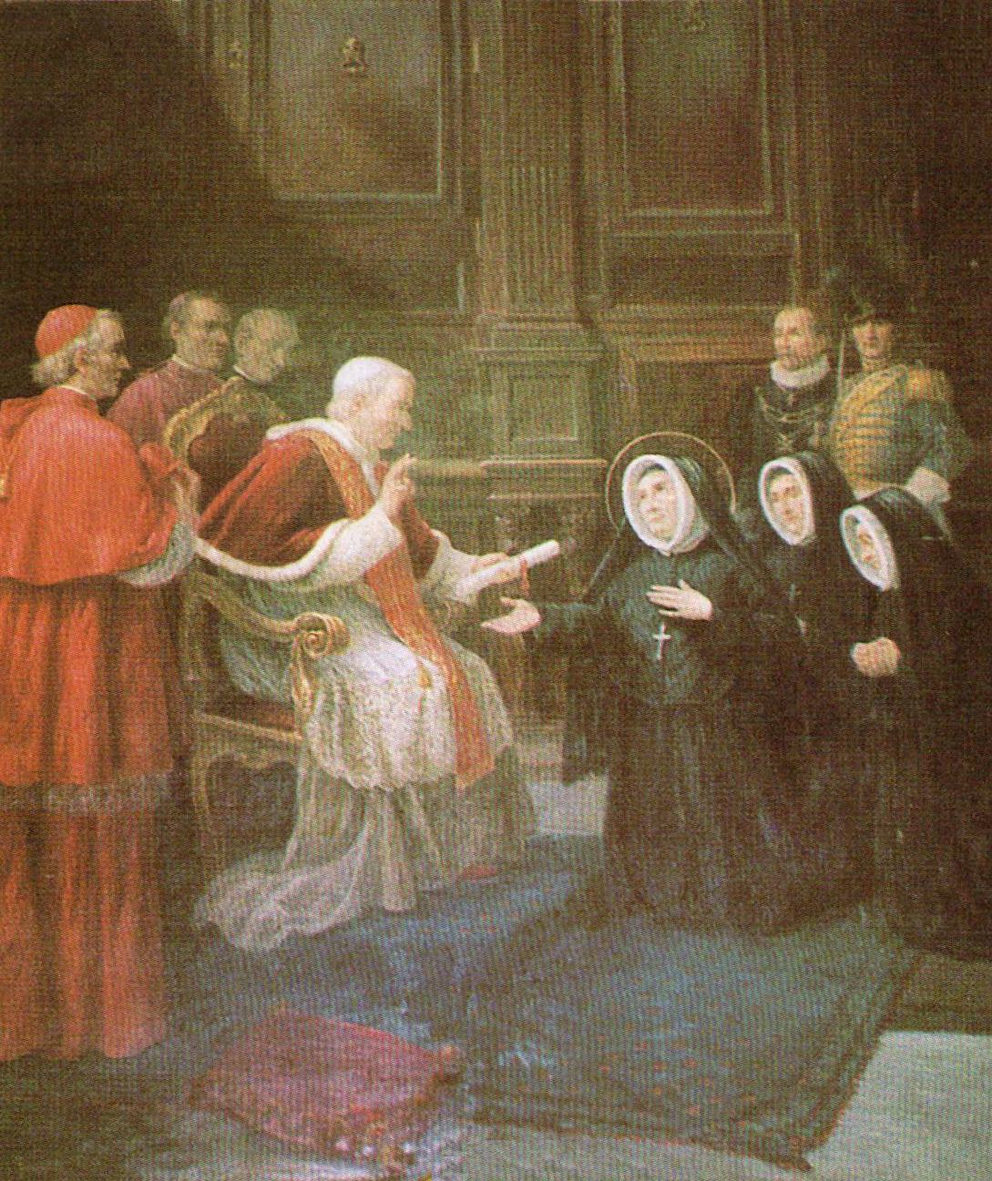 Madeleine-Sophie Barat Le pape Grégoire XVI approuve les constitutions en 1843